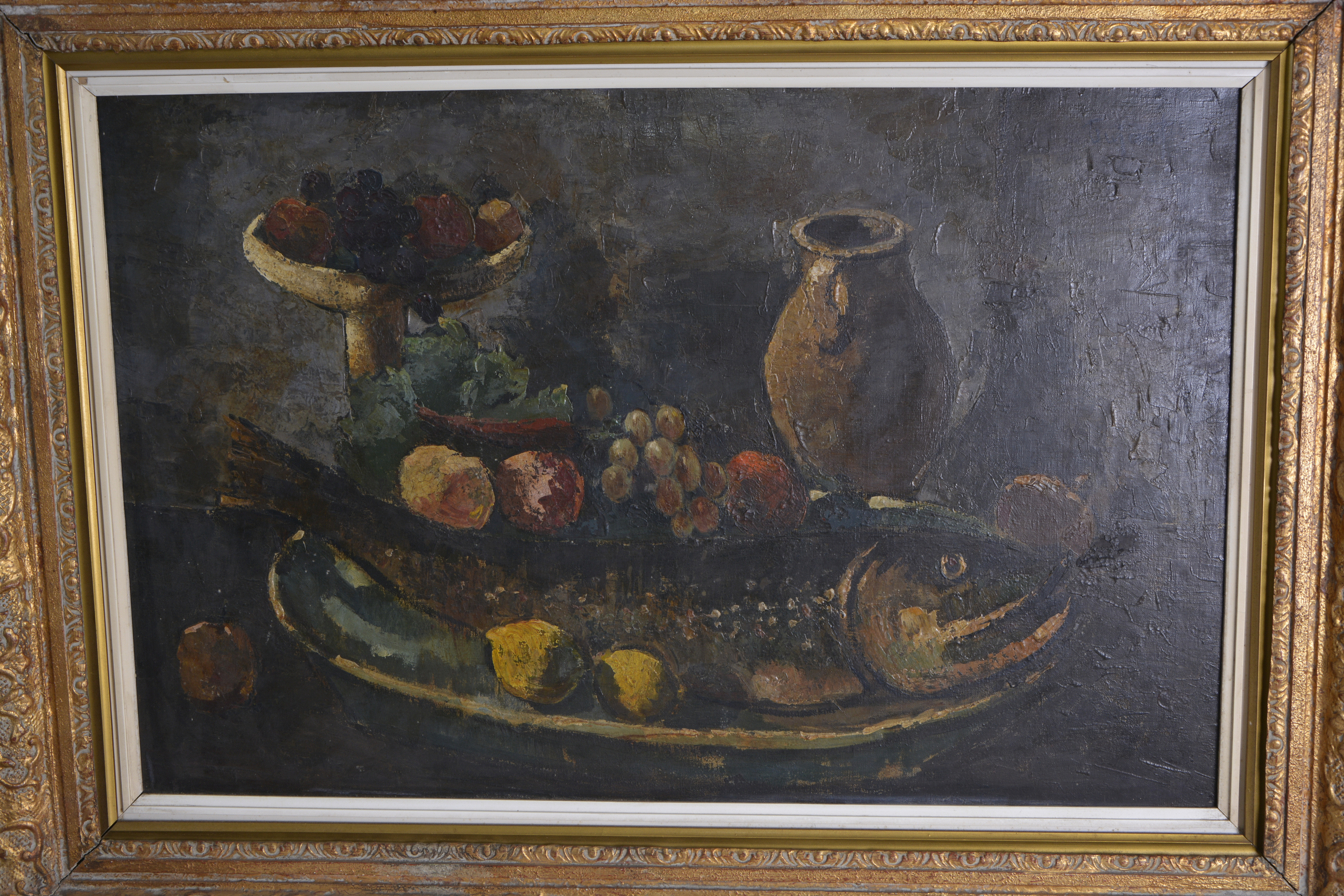 Srpski (latinica): Delo Mrtva priroda autora Jovana Bjelića. Godina nastajanja: 1930-1940. Tehnika: ulje na platnu. Deo je zbirke Istorije umetnosti Narodnog muzeja u Leskovcu.